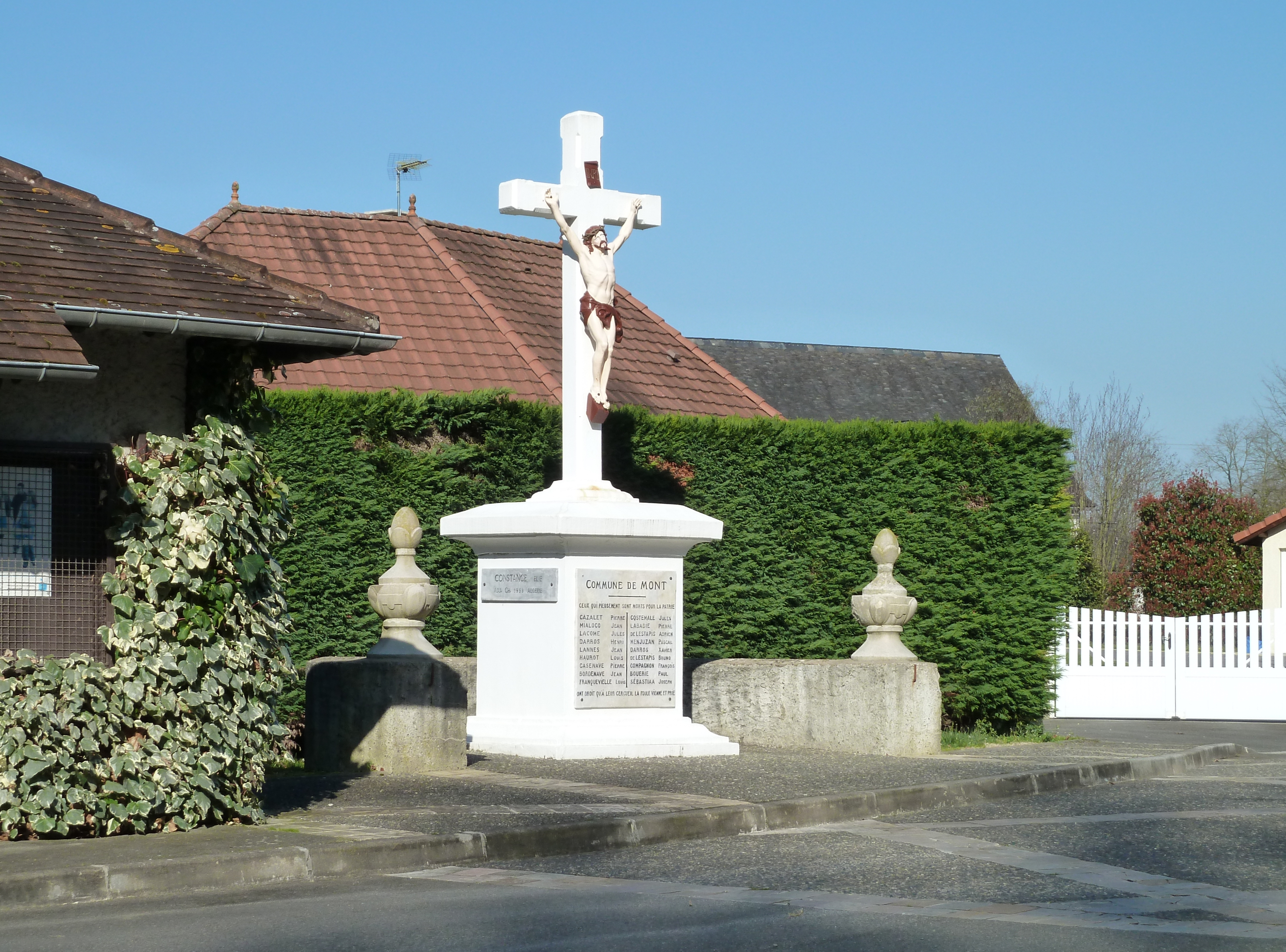 Monument aux morts de Mont (Pyrénées-Atlantiques)